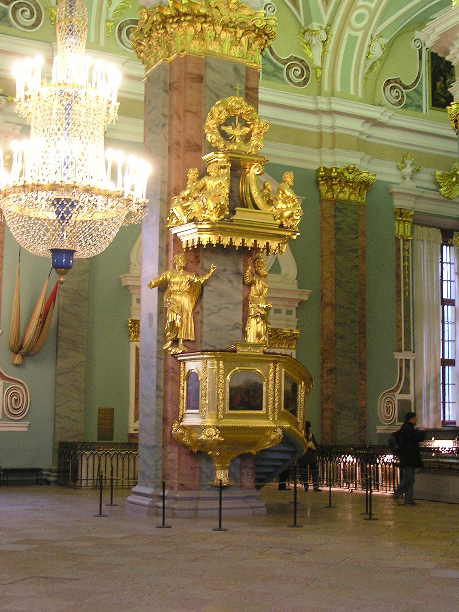 Санкт-Петербург. Петропавловский собор